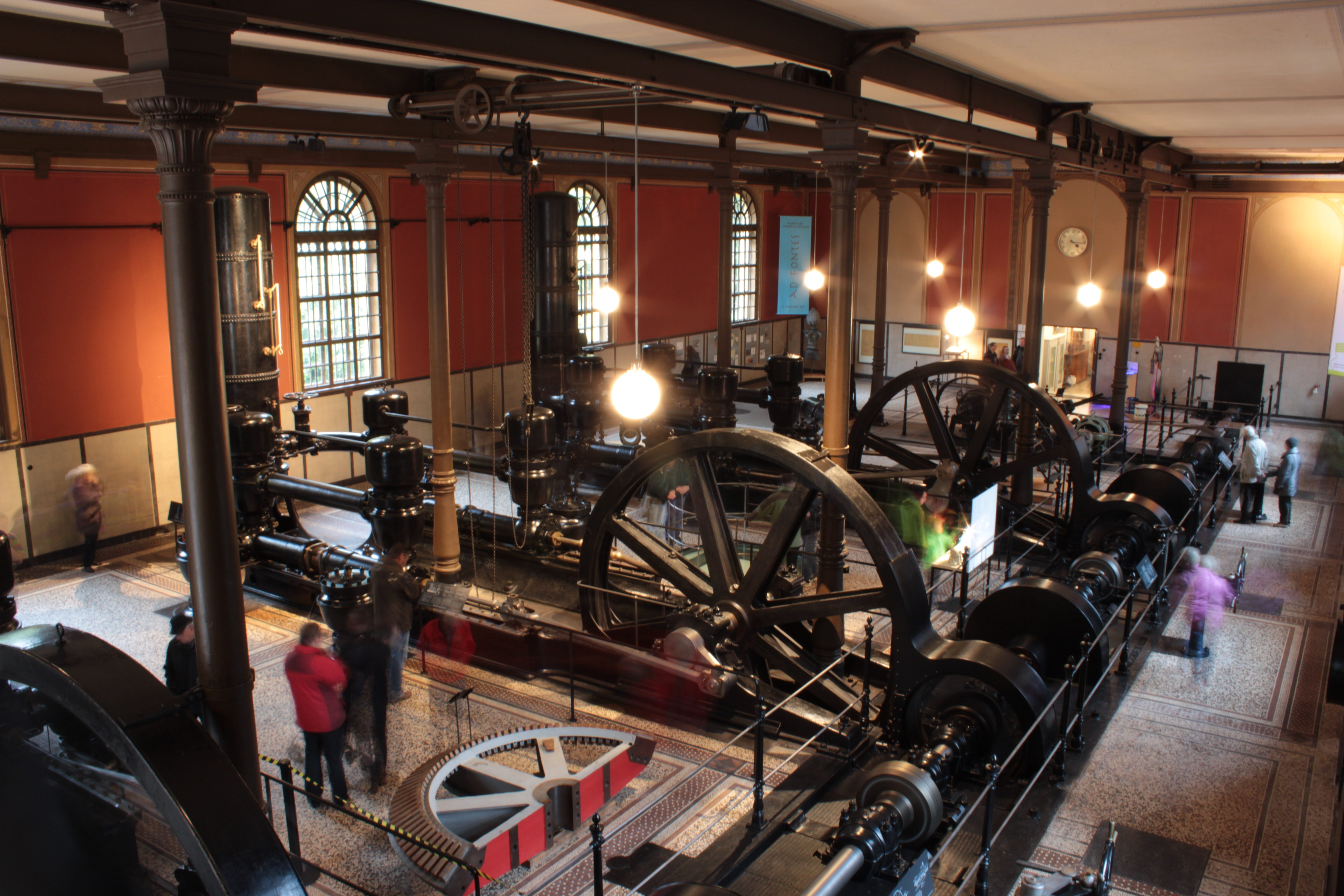 Halle mit Kolbenpumpen im Wasserwerk am Hochablass in Augsburg.